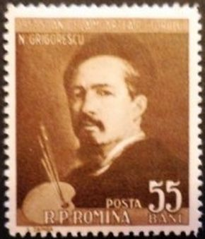 Timbru editat în anul 1957 cu Autoportretul pe care artistul și l-a făcut în anul 1868.